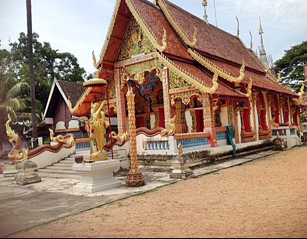 วัดปงยางคก